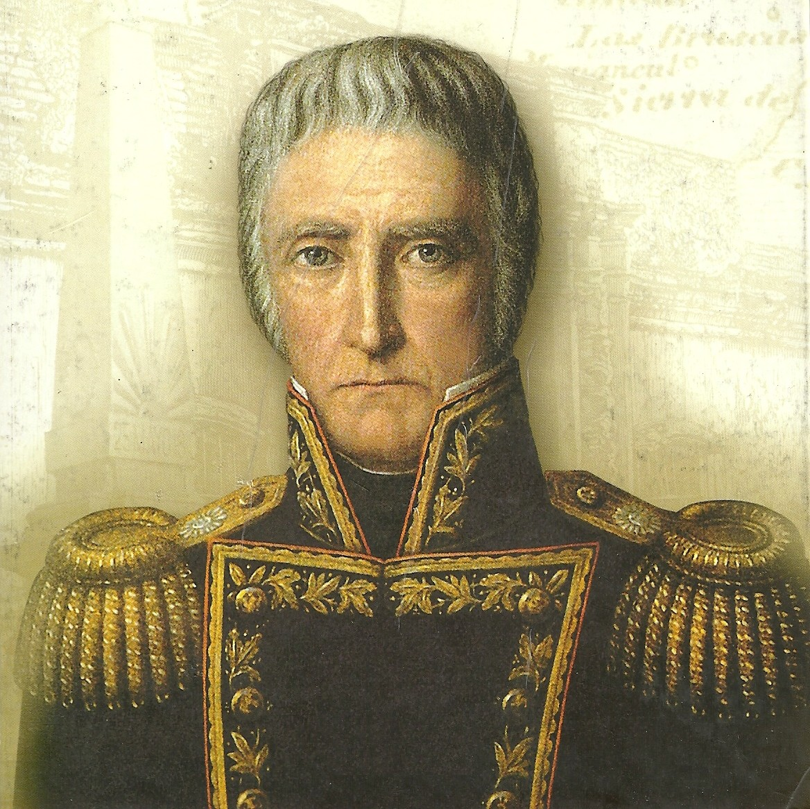 Cuadro de Cornelio Saavedra